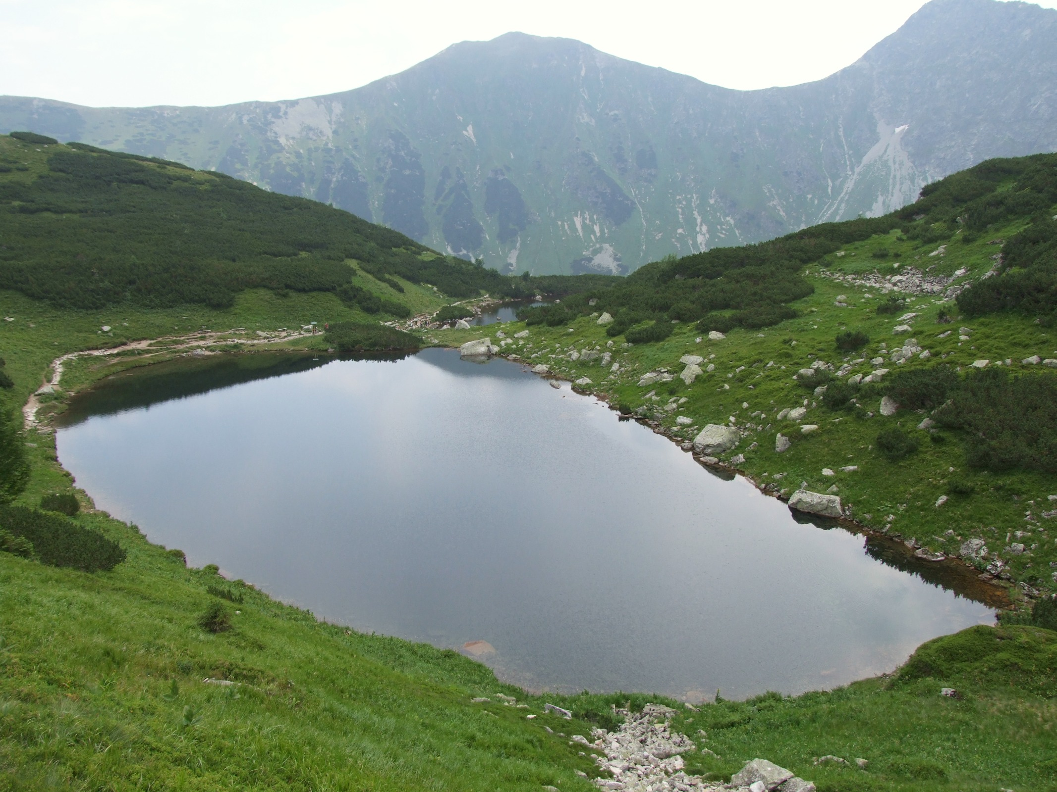 Pośredni Staw Rohacki. (Stawy Rohackie (Roháčske plesá) - West Tatra Mountains)